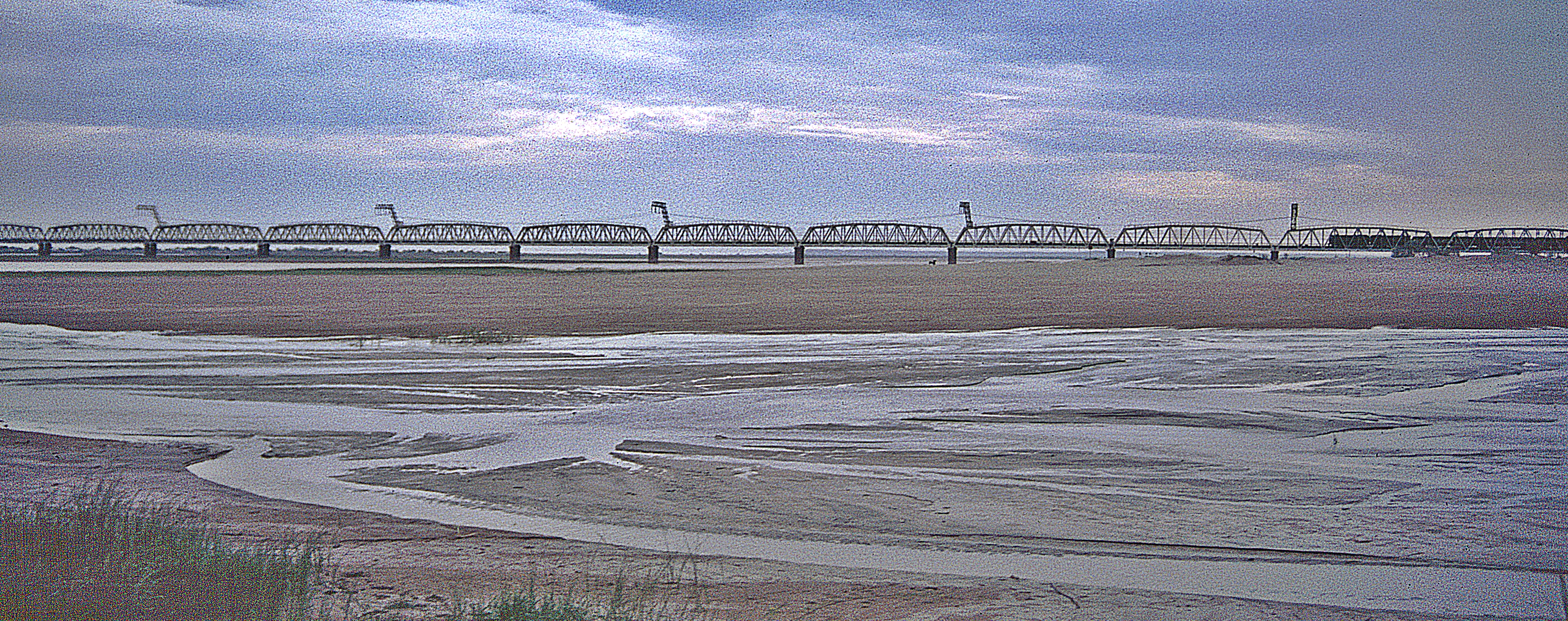 Amu Darja